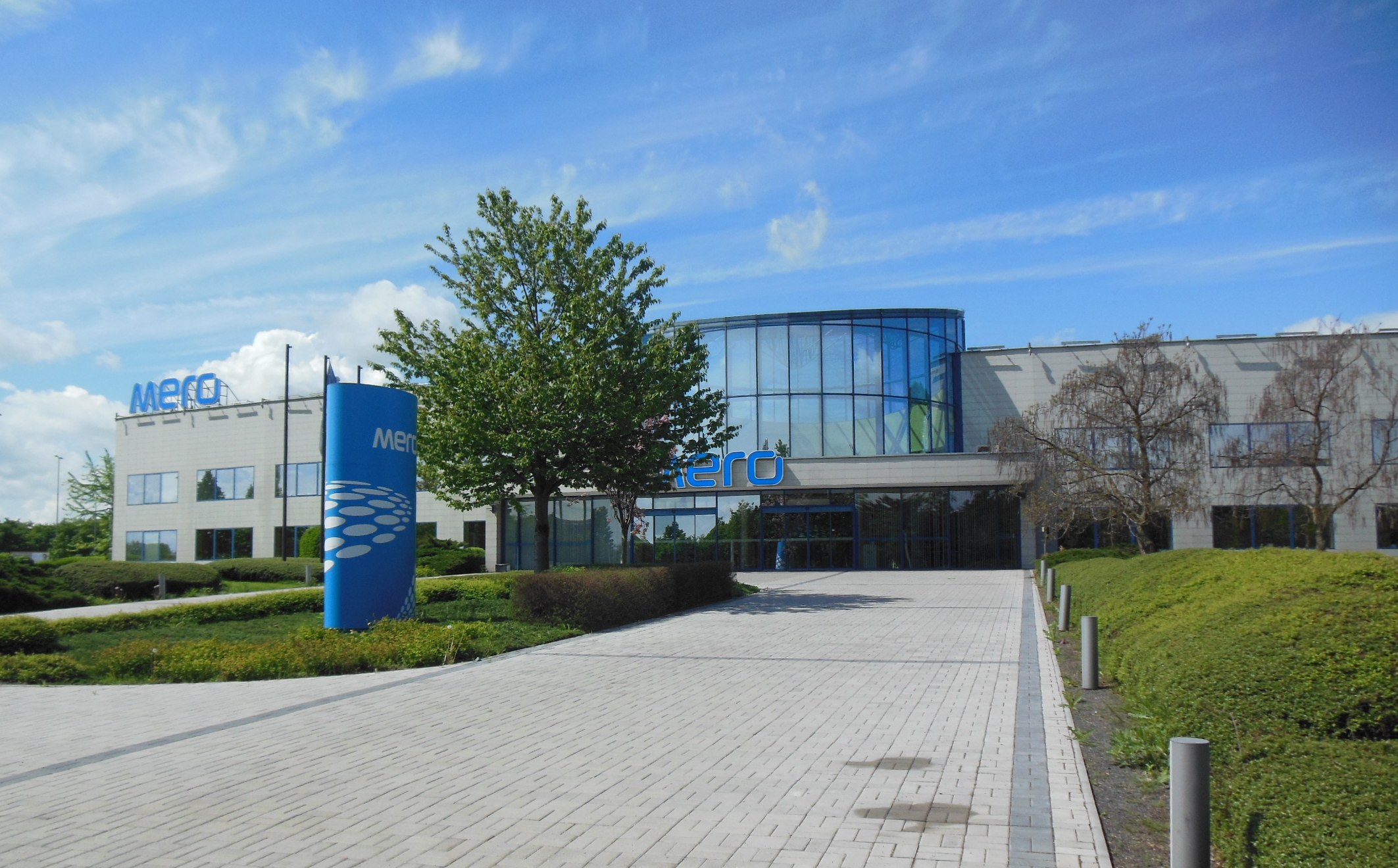 Budova spol. MERO ČR, a.s. v ulici Veltruská v Kralupech nad Vltavou.